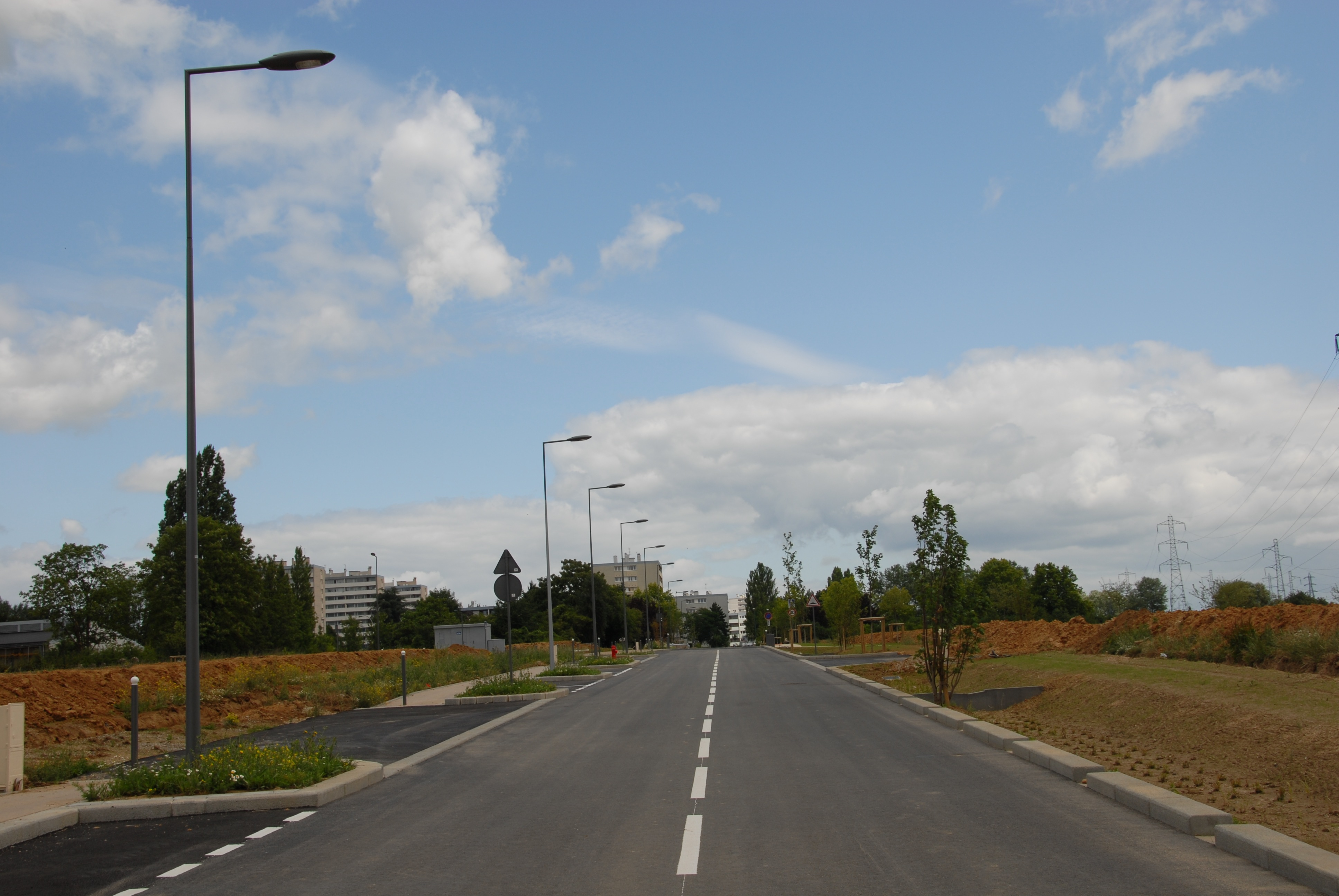 Parc d'activité des Tissonvilliers III